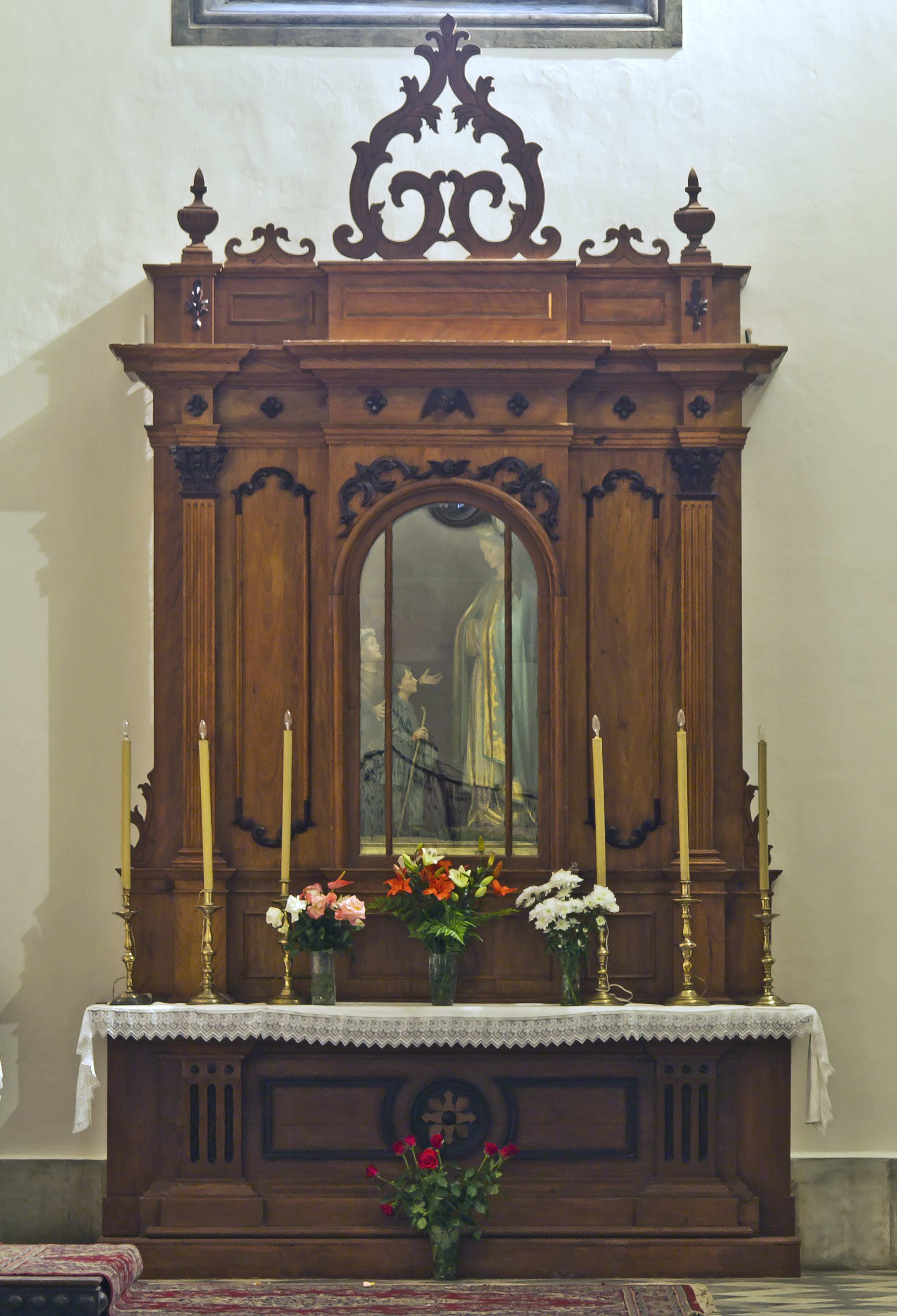 Retabel Nuestra Señora de La Salette in einer Seitenkapelle der Kathedrale in La Laguna